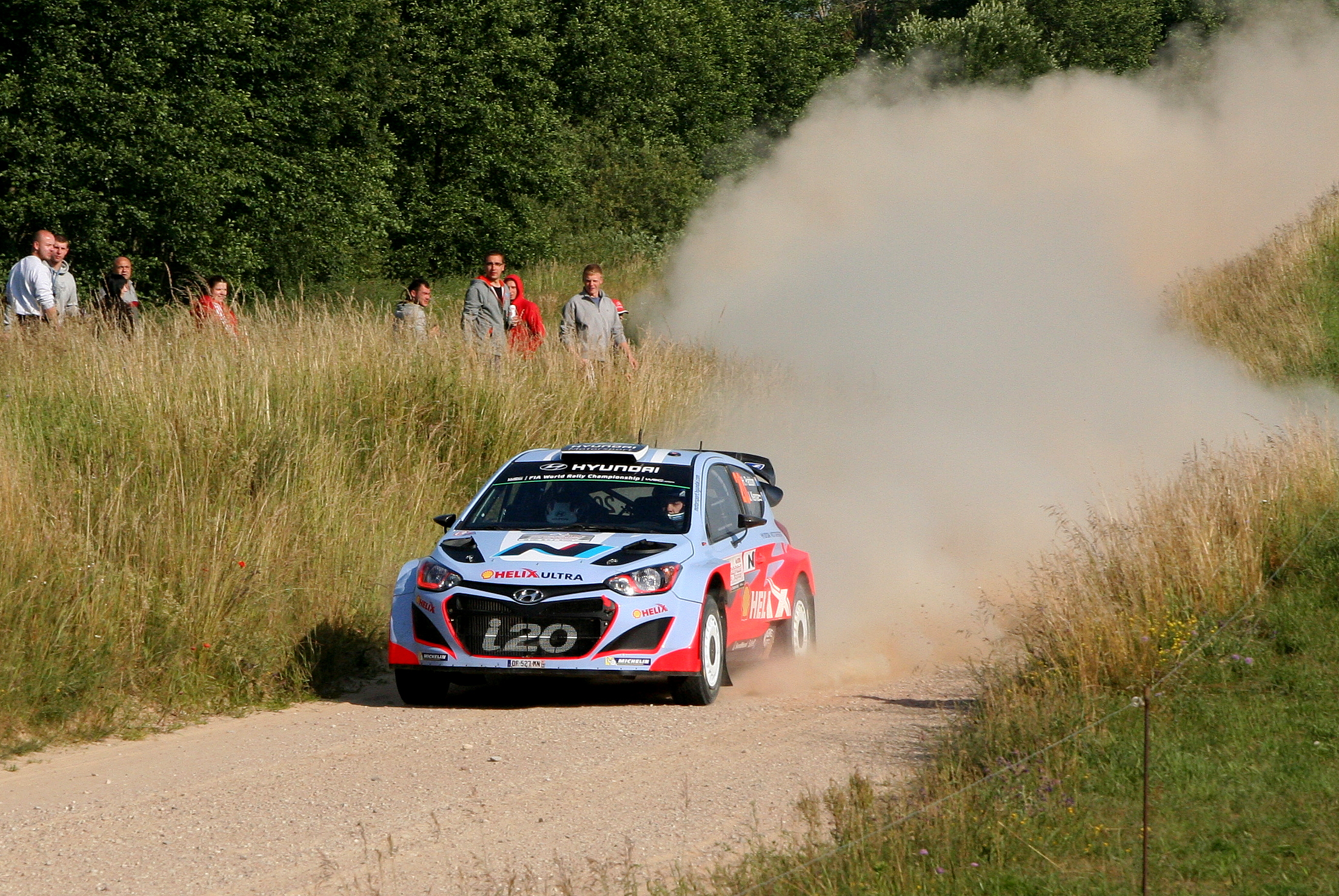 Hayden Paddon w Rajdzie Polski 2014, 11 OS